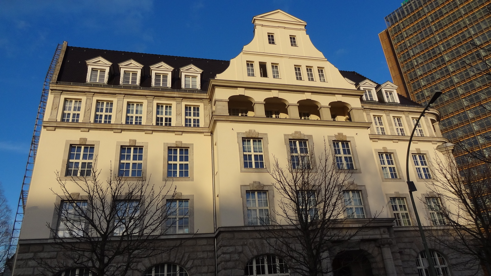 Im Dachgeschoss (links) des heutigen GIZ-Hauses befand sich von 1981 bis 1983 das Büro des Filmverleihs Gegenlicht.